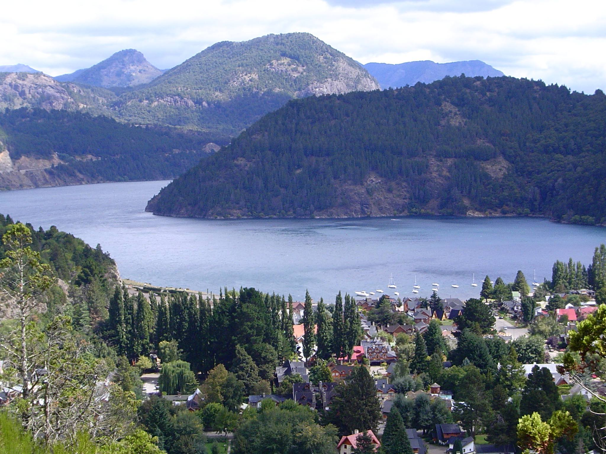 San Martín de los Andes, Departamento Lácar, Provincia del Neuquén, República Argentina. Fotografía tomada el 15 de marzo de 2006.